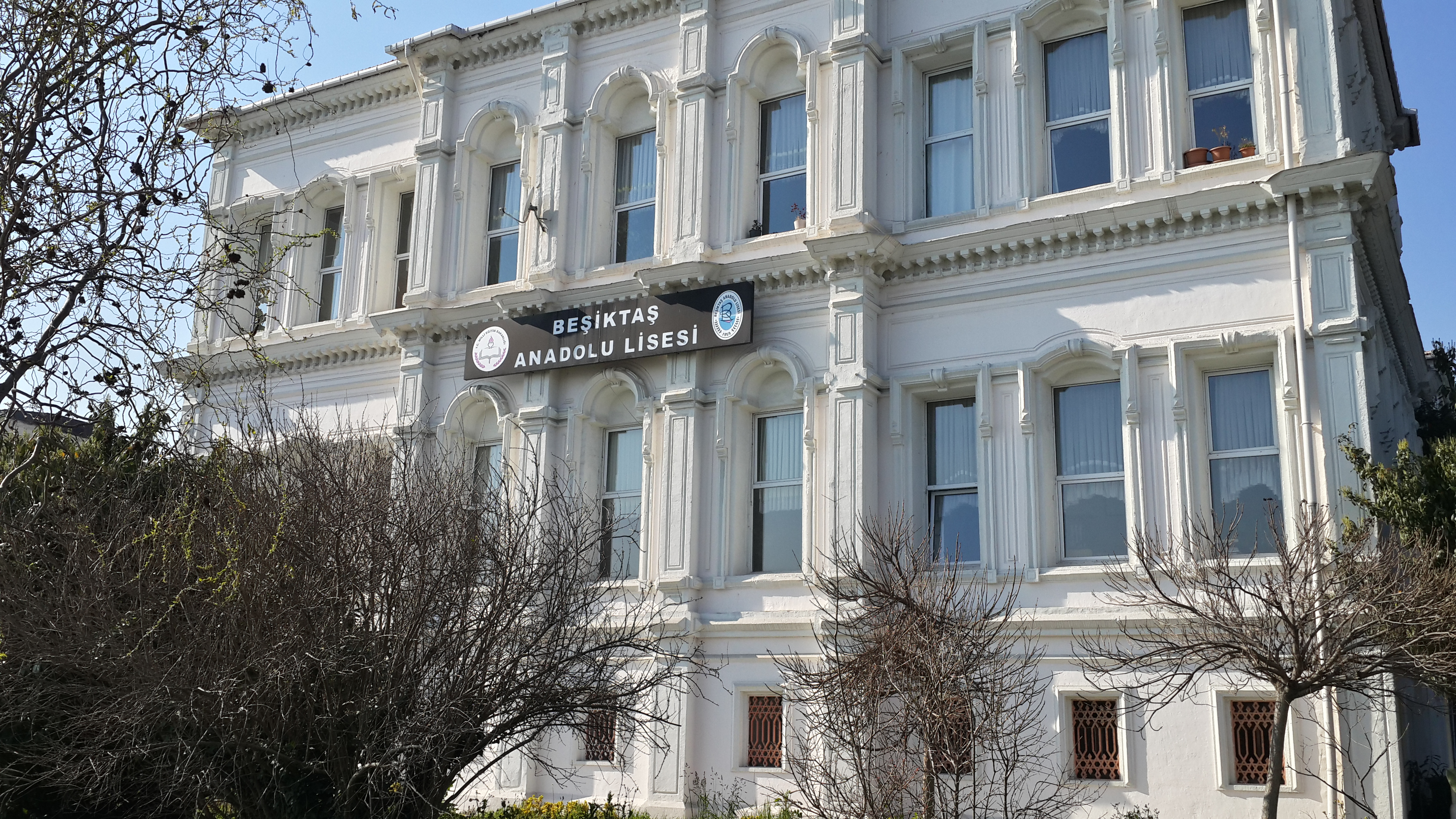 Fotoğrafı ben çektim ve Vikipedi'de yayınlanmasına izin veriyorum. İnternet sitesinde de "Bu sayfadaki görseller GNU Özgür Belgeleme Lisansı altında kullanılabilir." ibaresi bulunmaktadır. [1] Kategori:Okullar